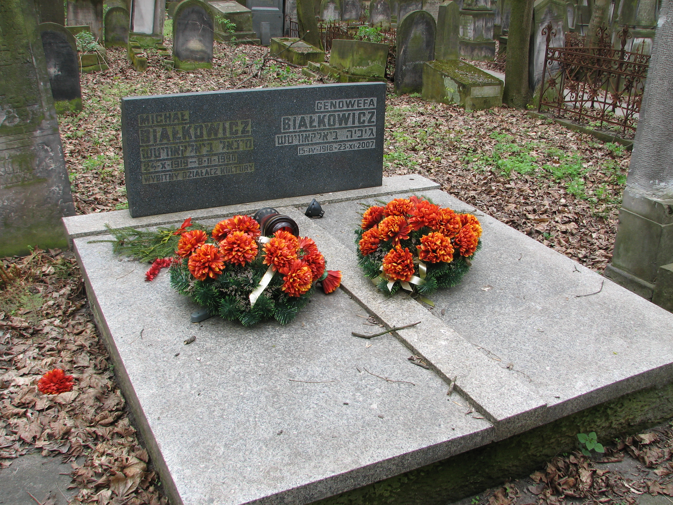 Michał Białkowicz grób - Warszawa, cmentarz żydowski na Woli, ul. Okopowa